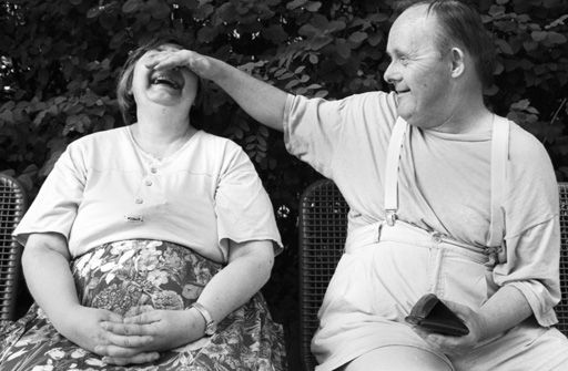 Walter Kistler mit Freundin. Walter Kistler überlebte die Nazizeit, da er von seinen Eltern versteckt wurde. Walter, 53 (Down-Syndrom). Erschienen in: ZEITmagazin, Nr. 37, 6. September 1996, S. 3, 8-15.